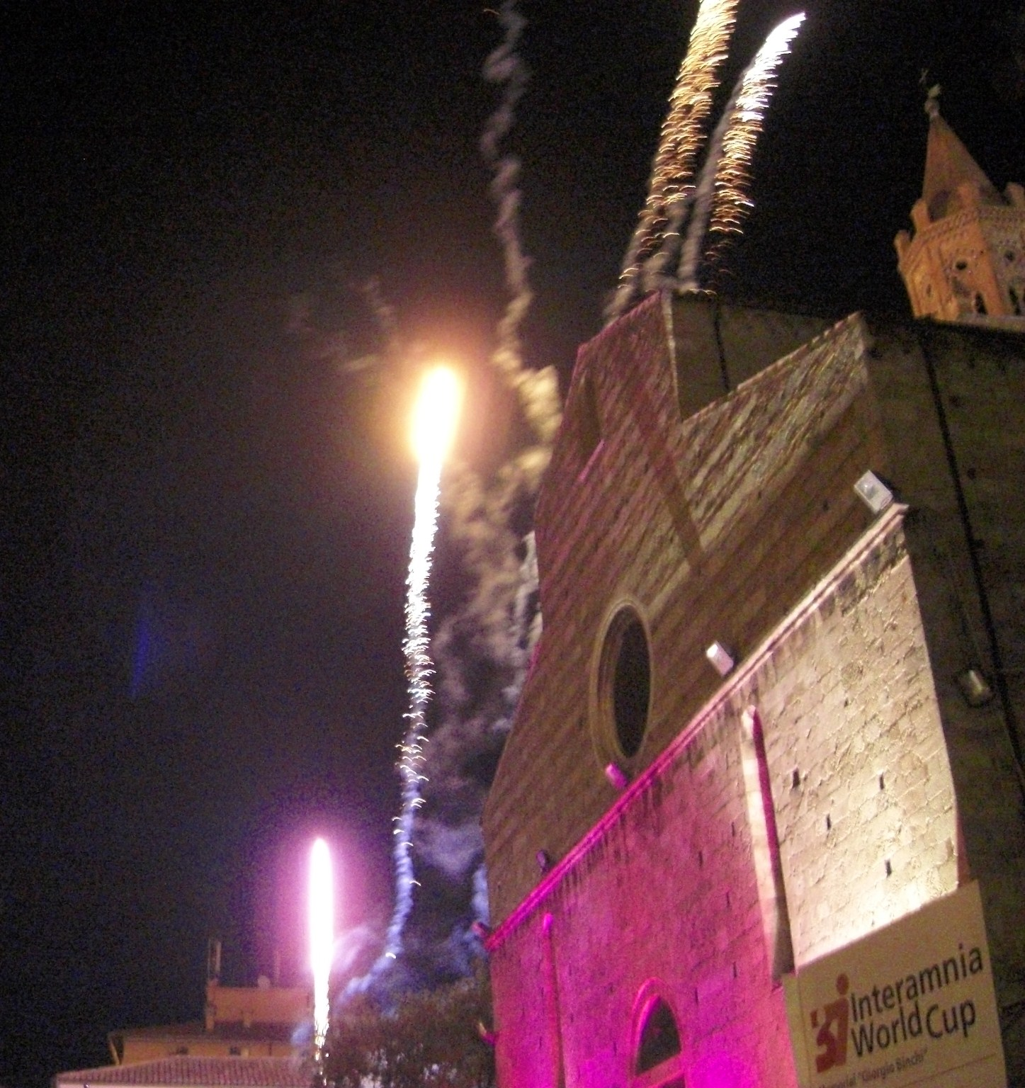 teramo, cerimonia nell'ambito di Interamnia World Cup.